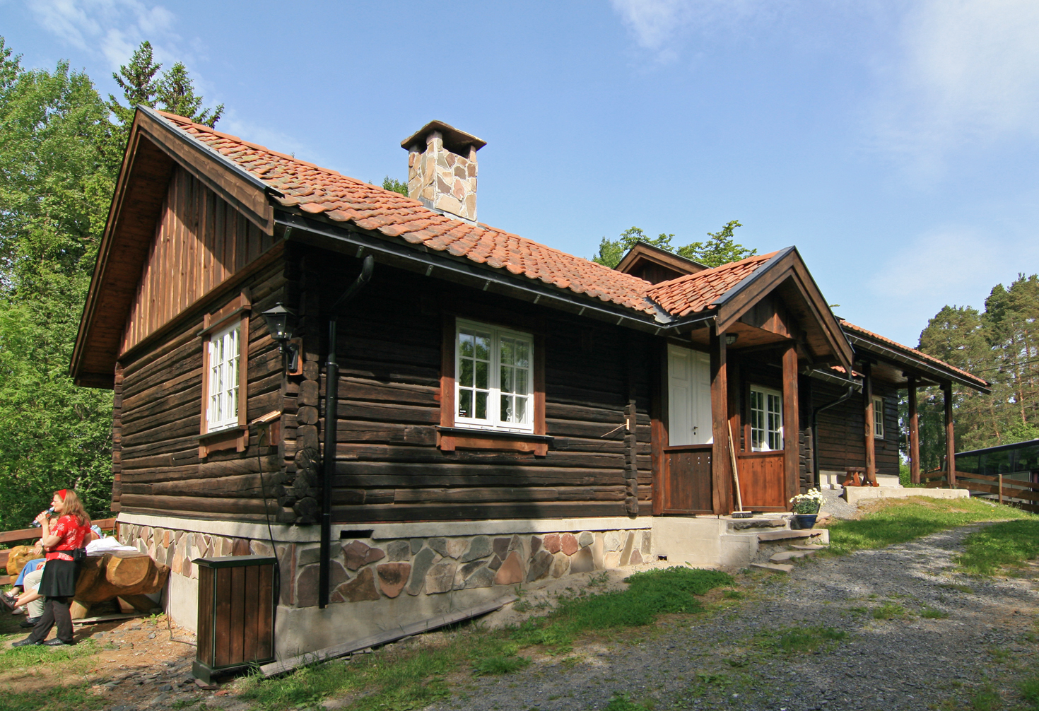 Kjerratmuseet, Åsa, Ringerike.